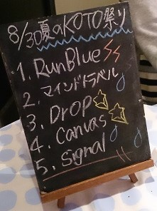 amiinaセトリボード(20150830(1))